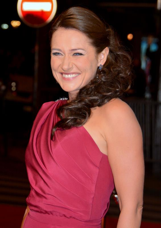 Sidse Babett Knudsen à la cérémonie des César